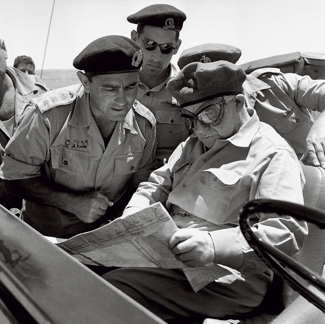 תרגיל שריון "פלט", מאי 1956. שר הביטחון, דוד בן-גוריון מעיין במפה , מסביר ורוכן לידו אל"מ יצחק פונדק, מפקד גייסות השריון. רחבעם זאבי בין שניהם.